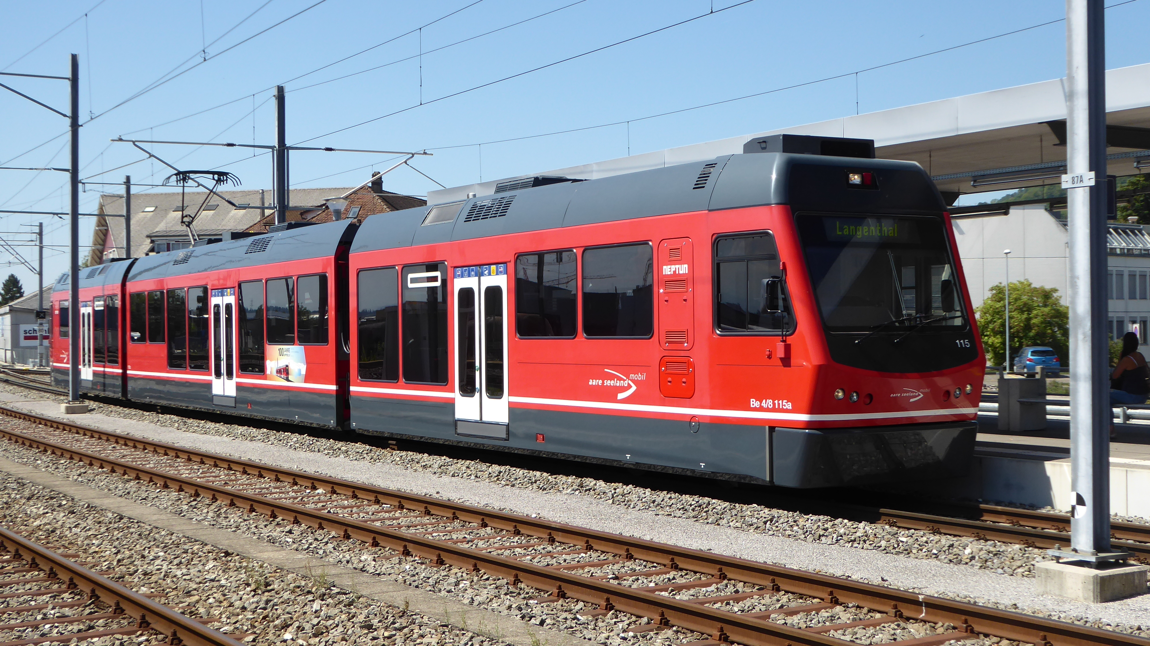 ASm Be 4/8 115 Neptun in Oensingen